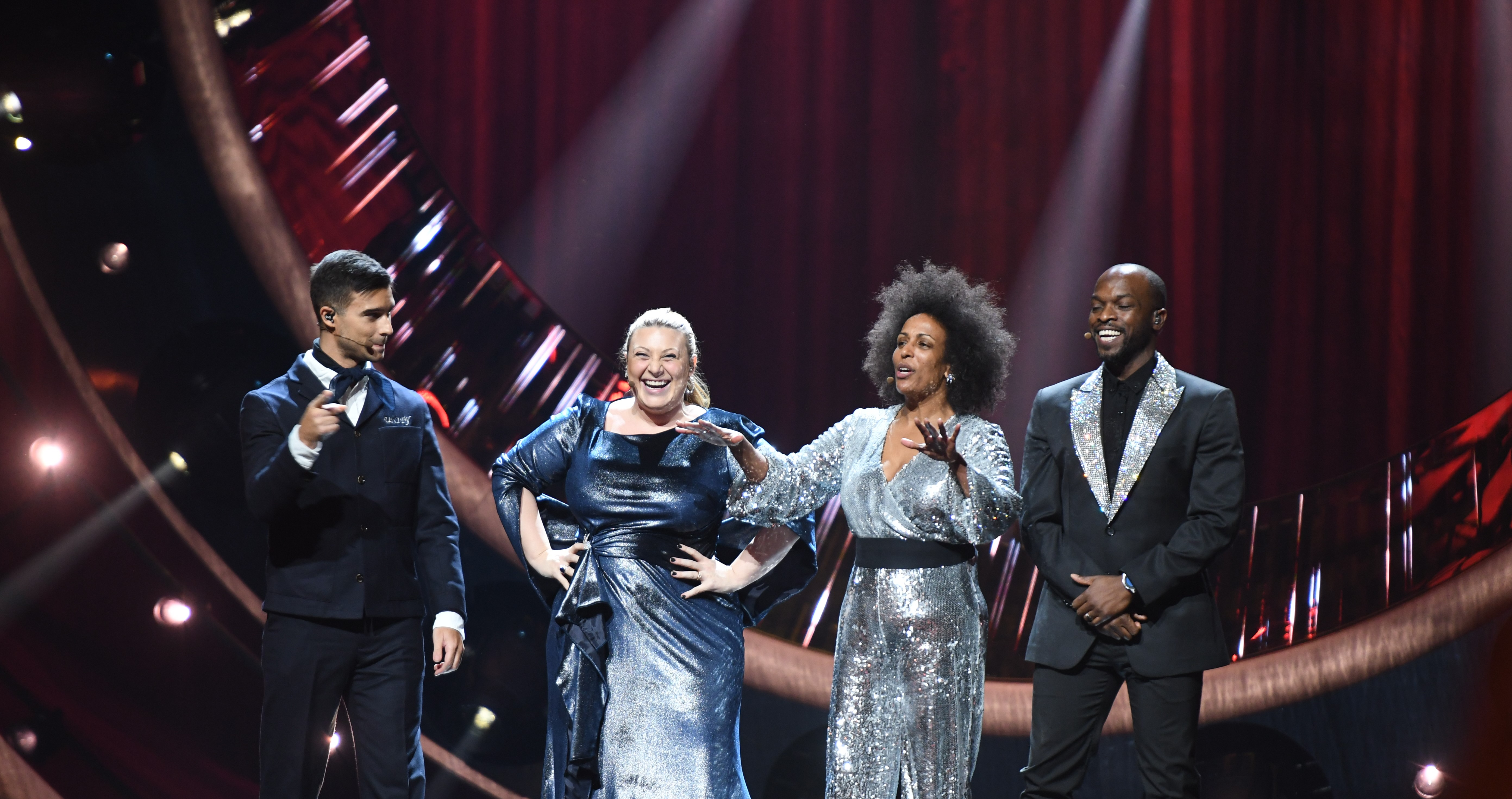 Melodifestivalen 2019, deltävling 1, Scandinavium, Göteborg, programledarna, intro, Kodjo Akolor, Marika Carlsson, Sarah Dawn Finer, Eric Saade